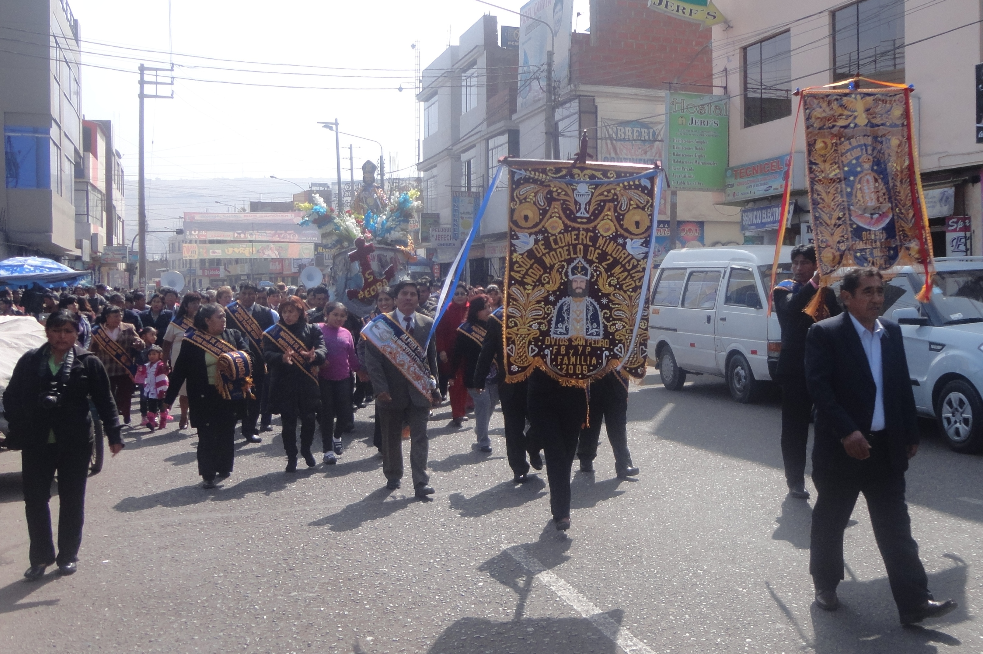 procesion san pedro tacna